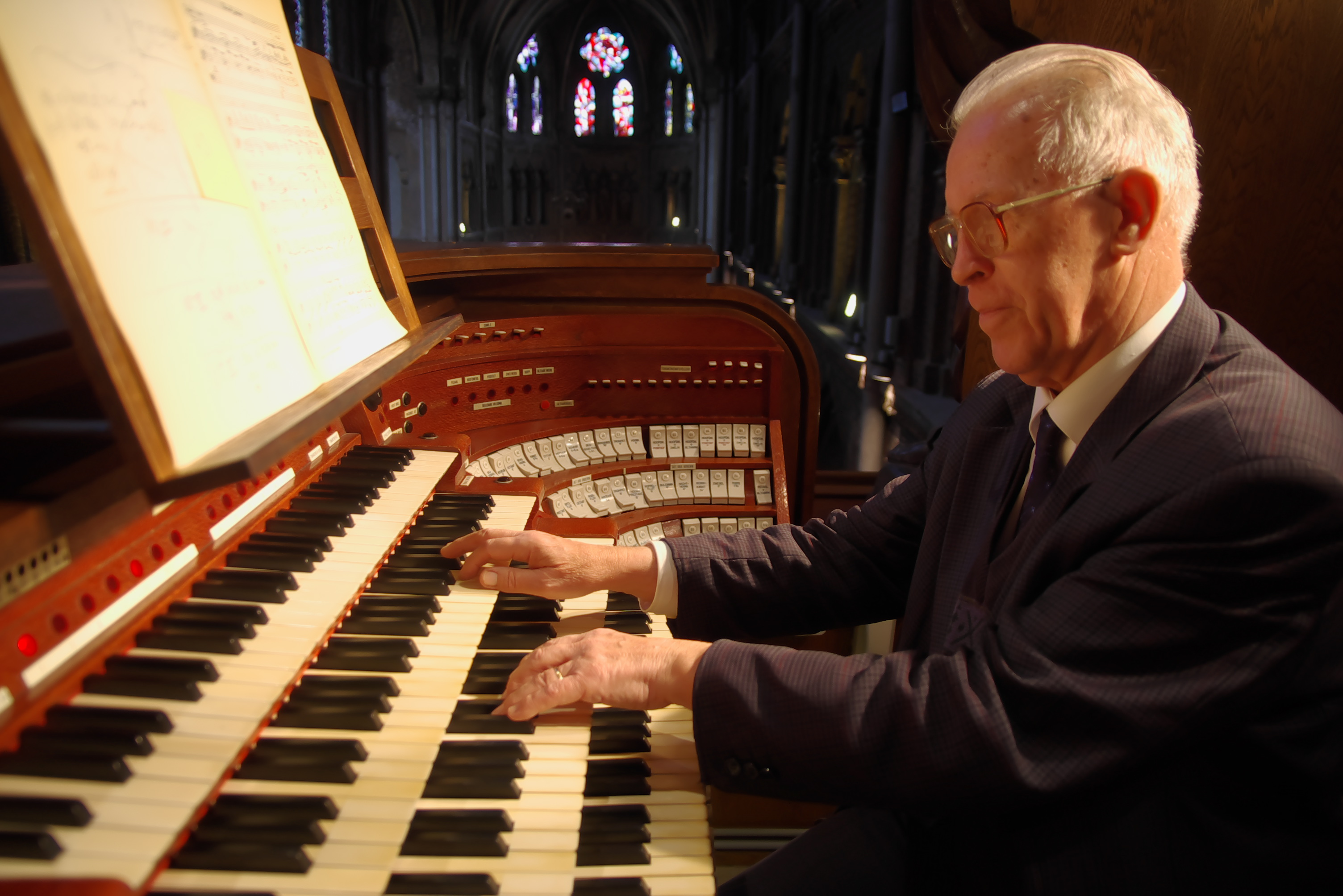 Bernard Bartelink achter het Verschueren orgel van de Catharinakerk te Eindhoven